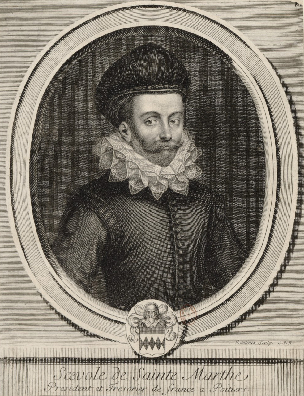 "Scévole de Sainte-Marthe, président et trésorier de France à Poitiers."